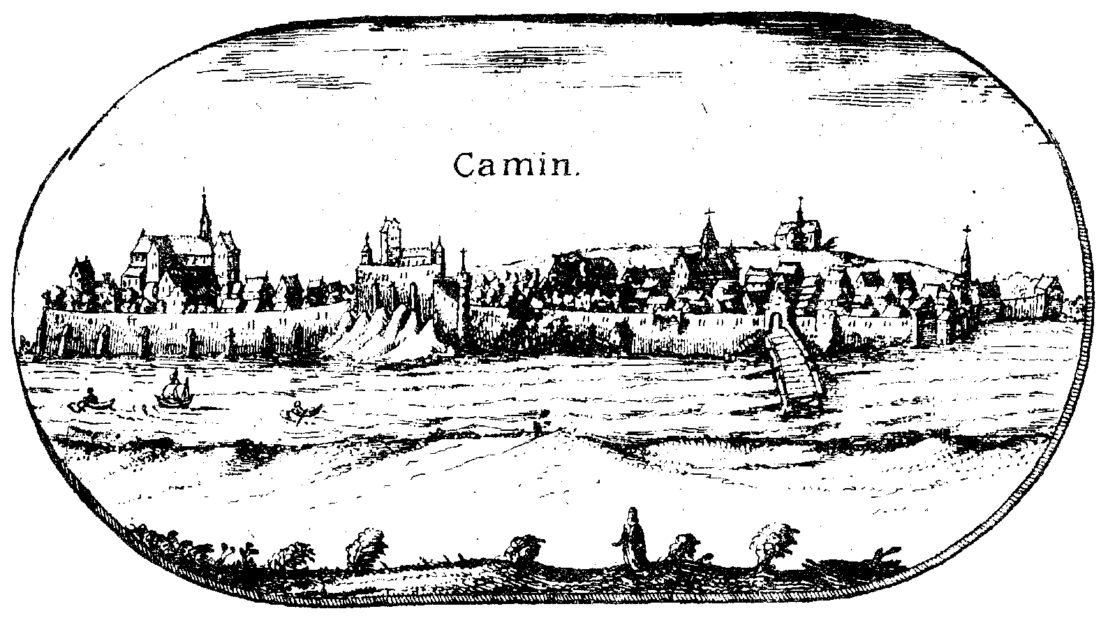 Rycina miasta Kamień Pomorski z mapy Lubinusa - Mapa księstwa pomorskiego z 1618 roku.